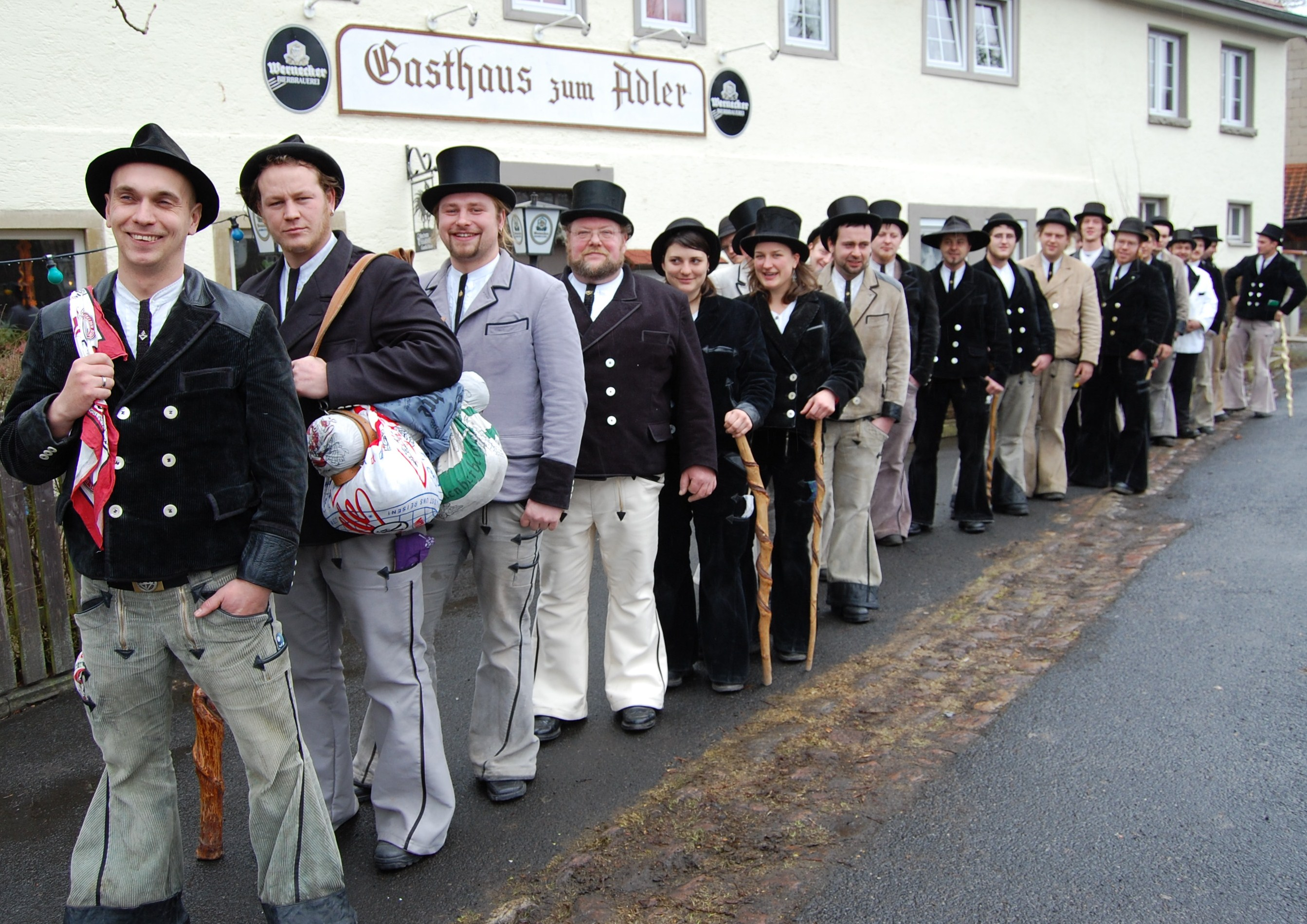 Wandergesellen-Treffen in Bad Kissingen (Bayern)